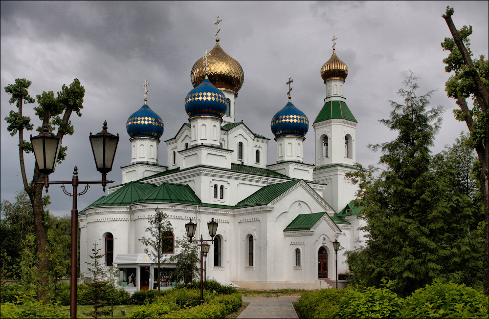 Царква